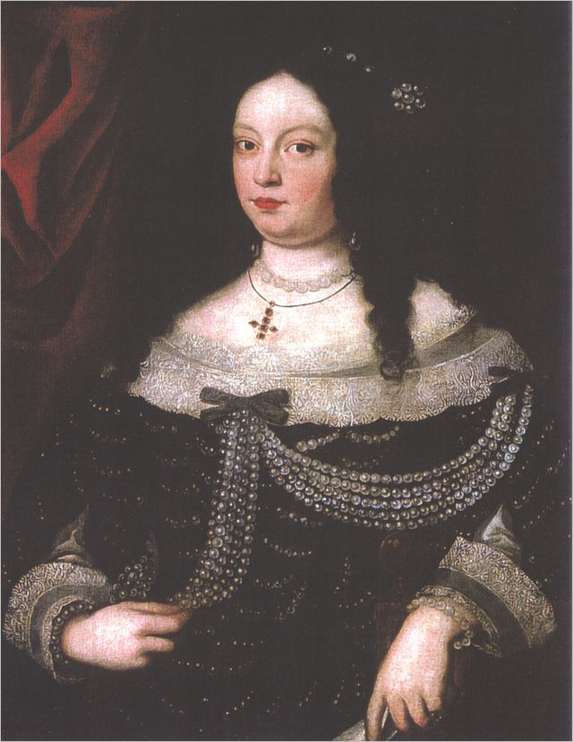 Vittoria Farnese. Seconda moglie di Francesco I d'Este, duca di Modena e Reggio col dominio della Garfagnana. Duchessa dal 1648 al 1649.